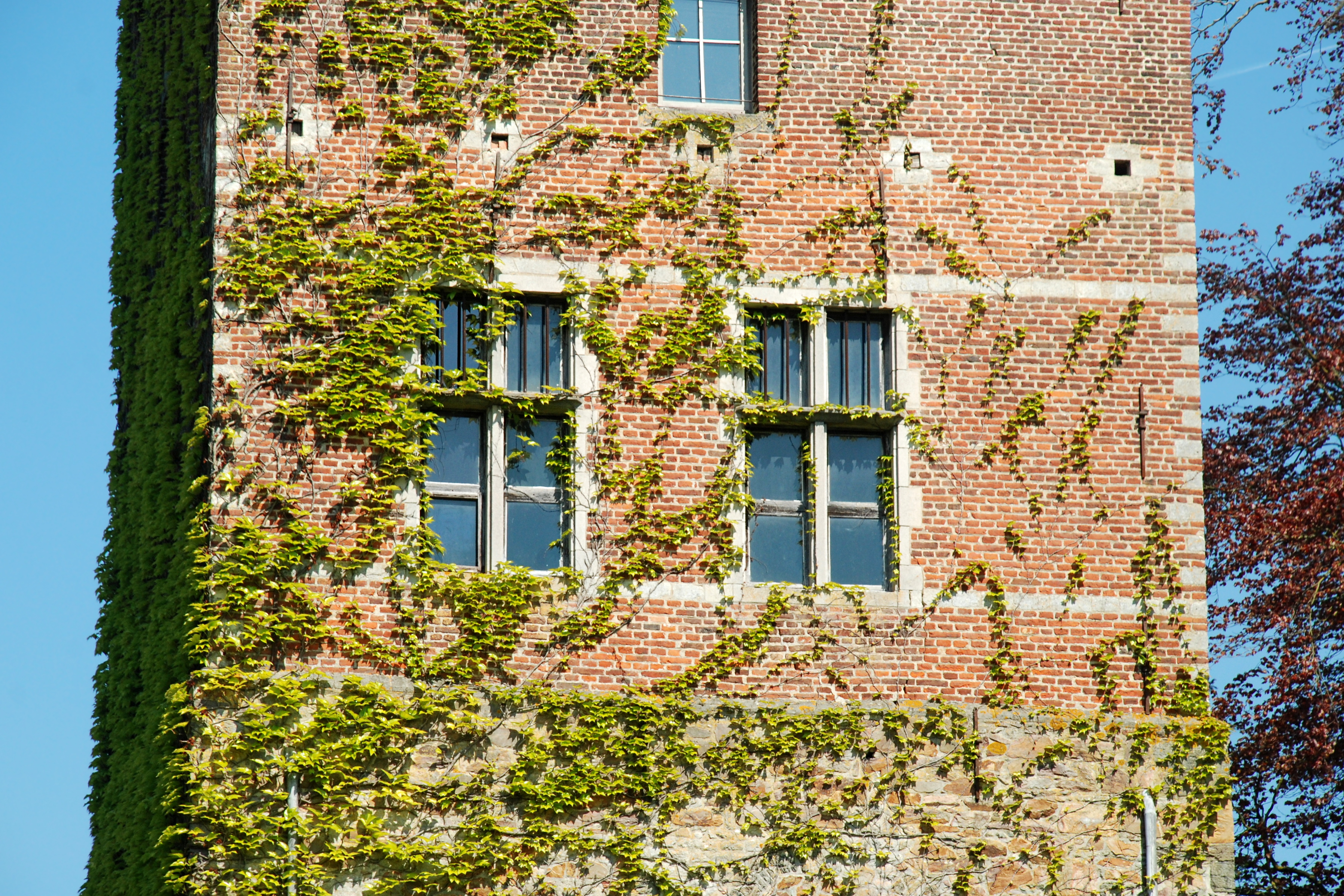 Belgique - Brabant wallon - Mont-Saint-Guibert - Hévillers - Donjon de Bierbais